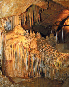 Conjunto de formaciones La Selva Virgen